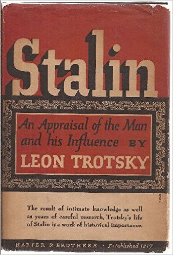 «Сталин» — двухтомная биография Иосифа Сталина, написанная Львом Троцким в 1938—1940 годах.